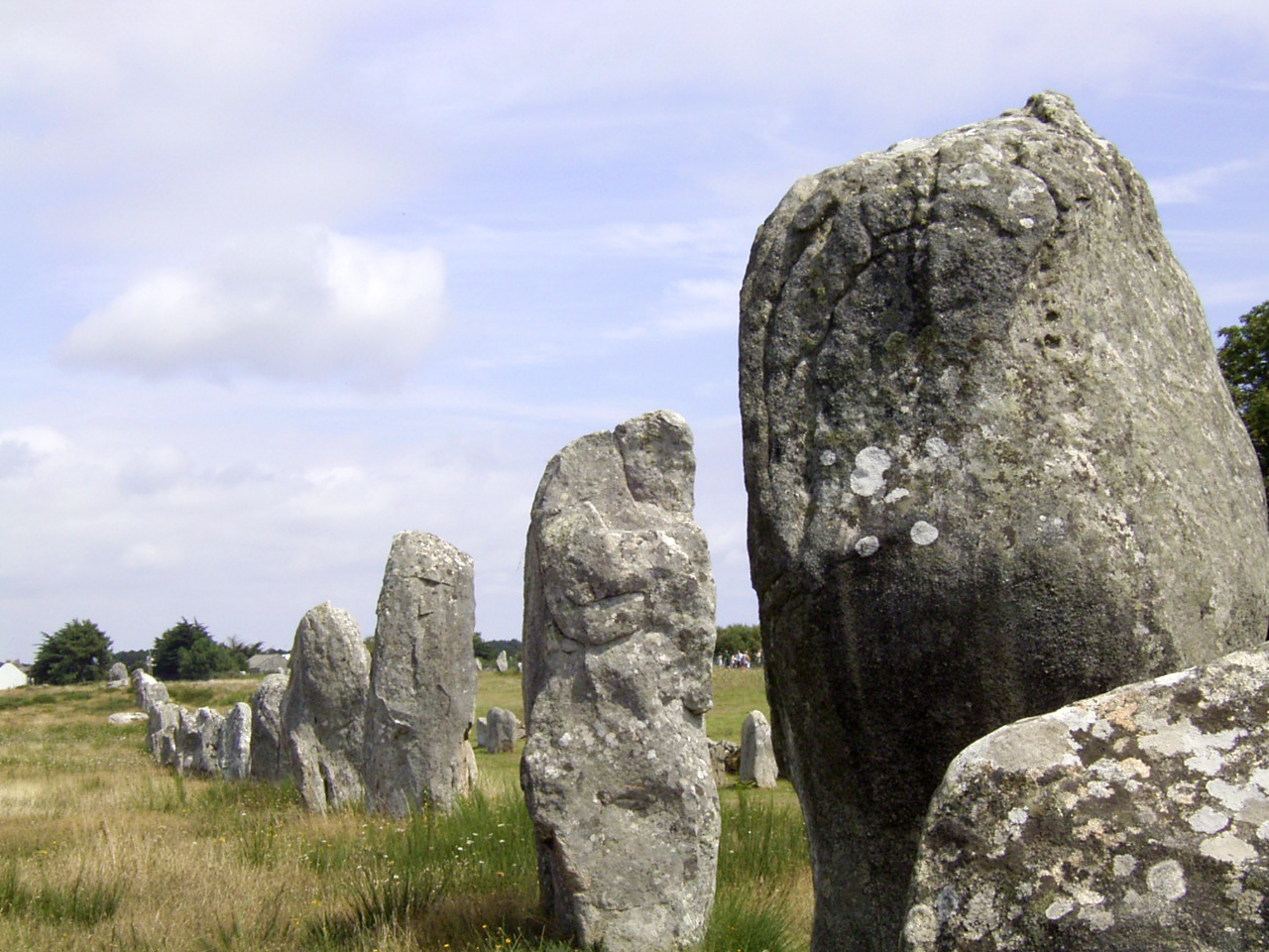 Menec Alignment, megalithische Steinreihen bei Carnac, Frankreich